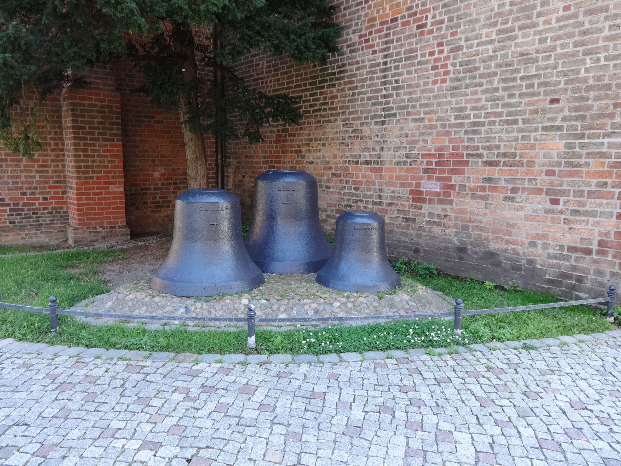 St. Jacobi, evangelische Stadtkirche in Nauen, Havelland, Brandenburg